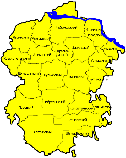 Адм. карта Чувашии